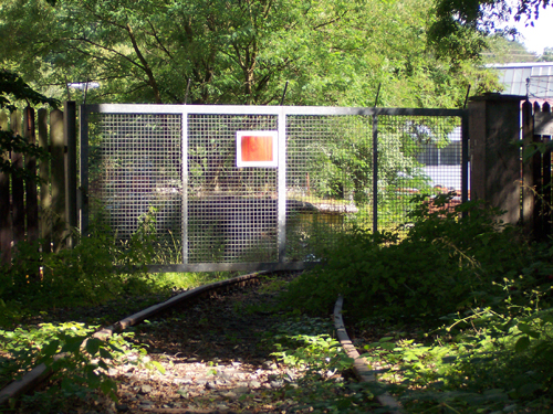 Gleisanschluss der Alfing-Kessler-Werke in Aalen-Wasseralfingen (heute stillgelegt)